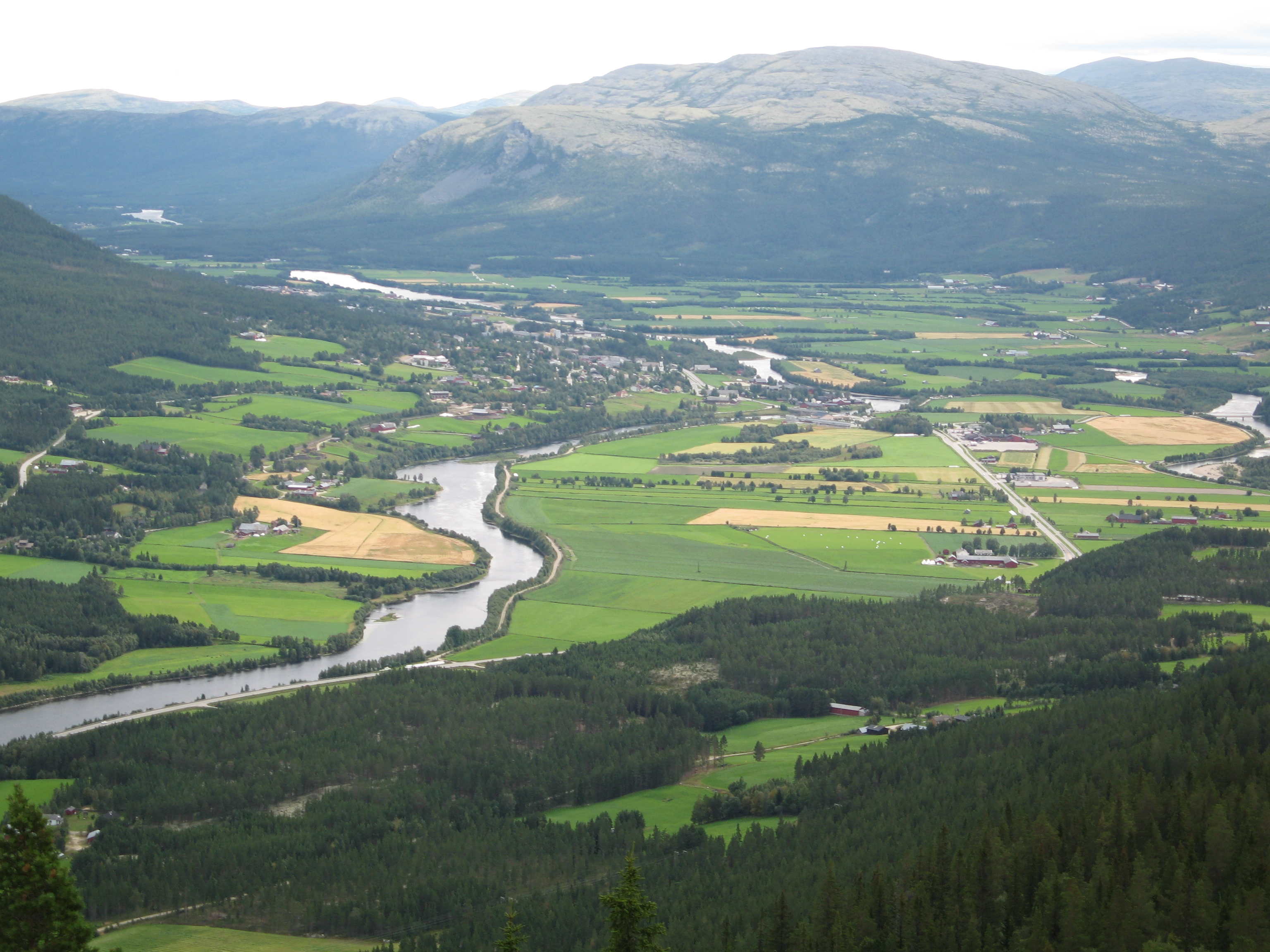 Glåma gjennom Alvdal